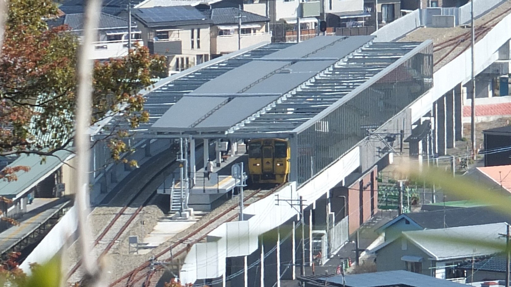 JR慈眼寺駅の駅舎